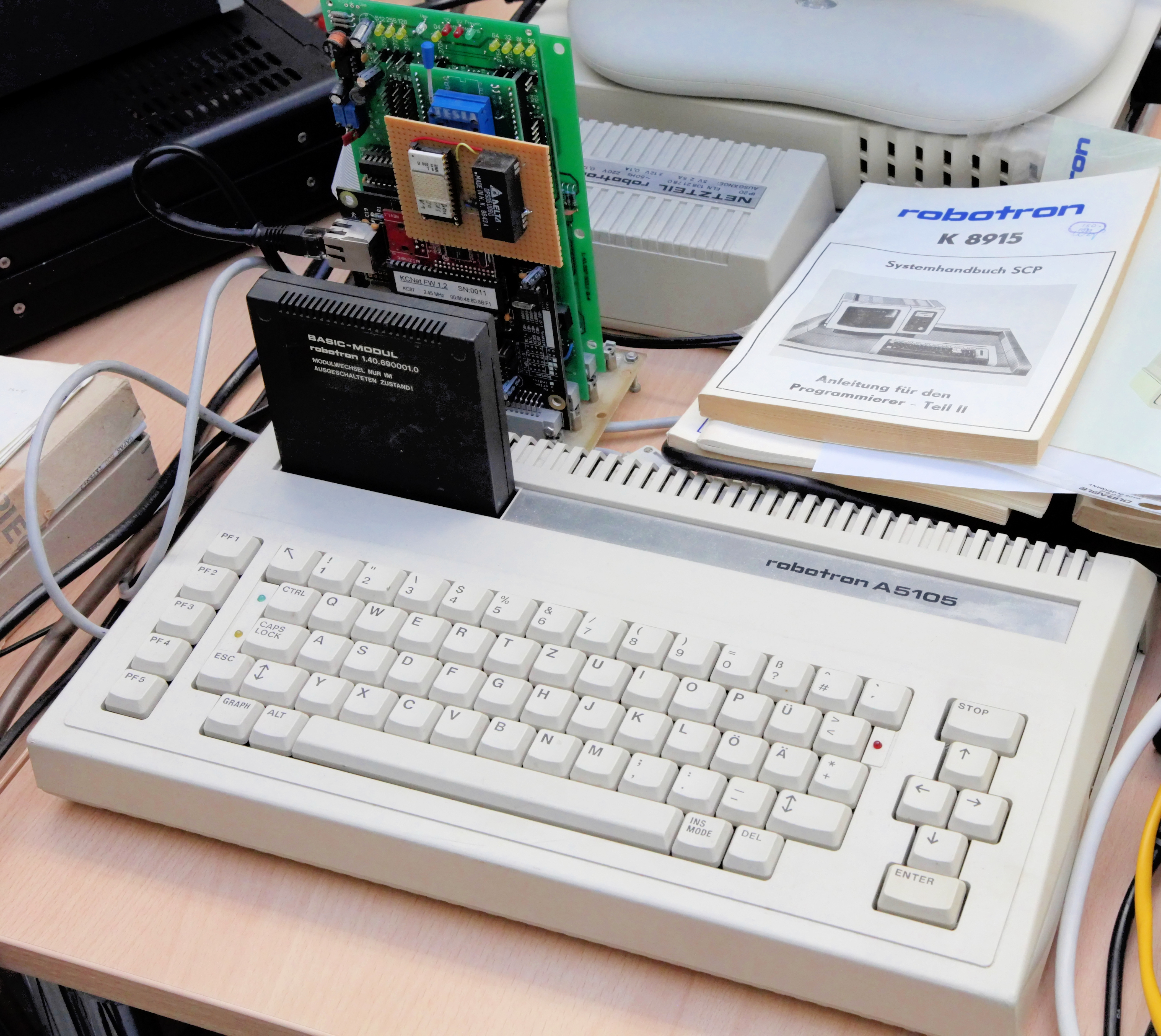 Gerät inkl. Basic Cartridge